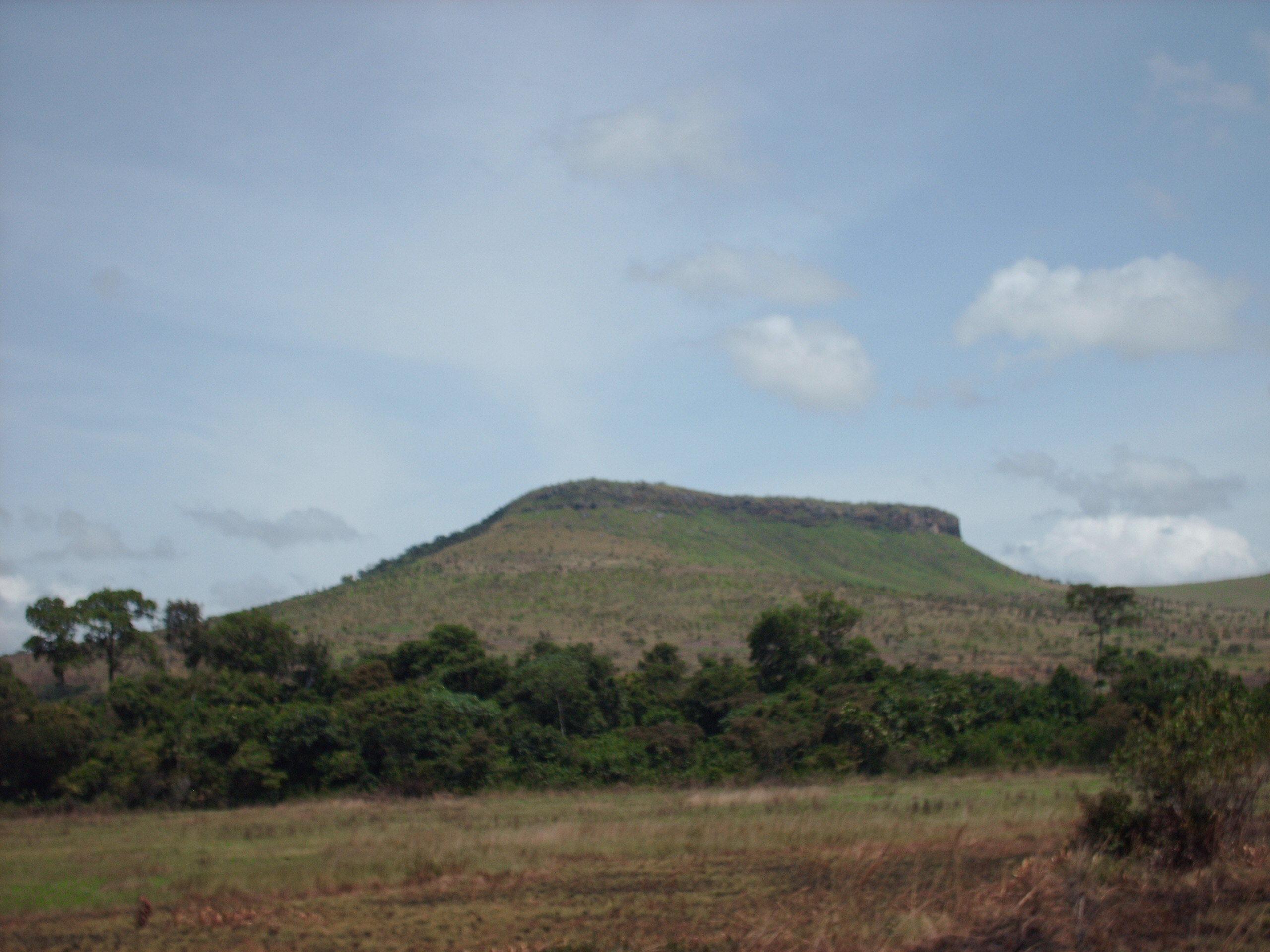 Paysage du département des Plateaux (République du Congo), photographié depuis la route nationale n° 2.